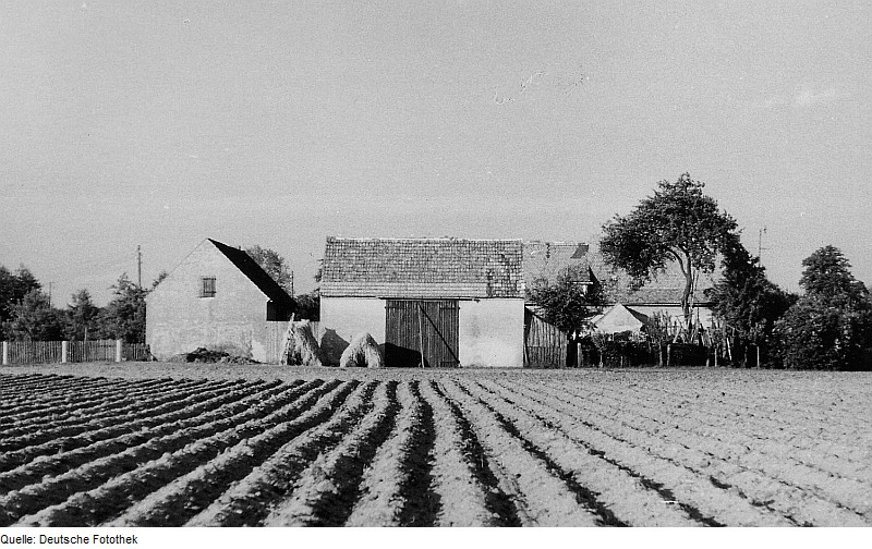 Original image description from the Deutsche Fotothek Mücka-Förstgen. Blick vom Windmühlenberg auf das ehem. Windmühlenwirtschaftsgebäude (Nr. 11)